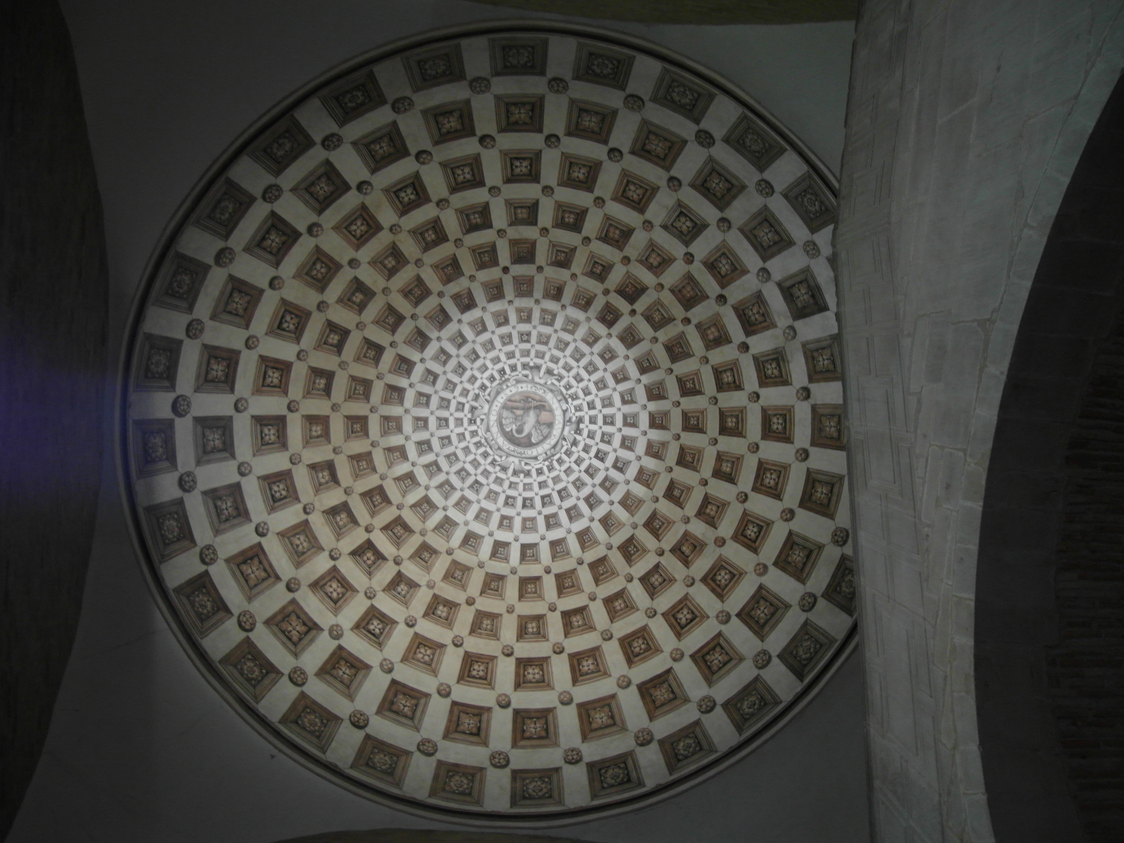 Santa María la Real, Nájera, La Rioja.